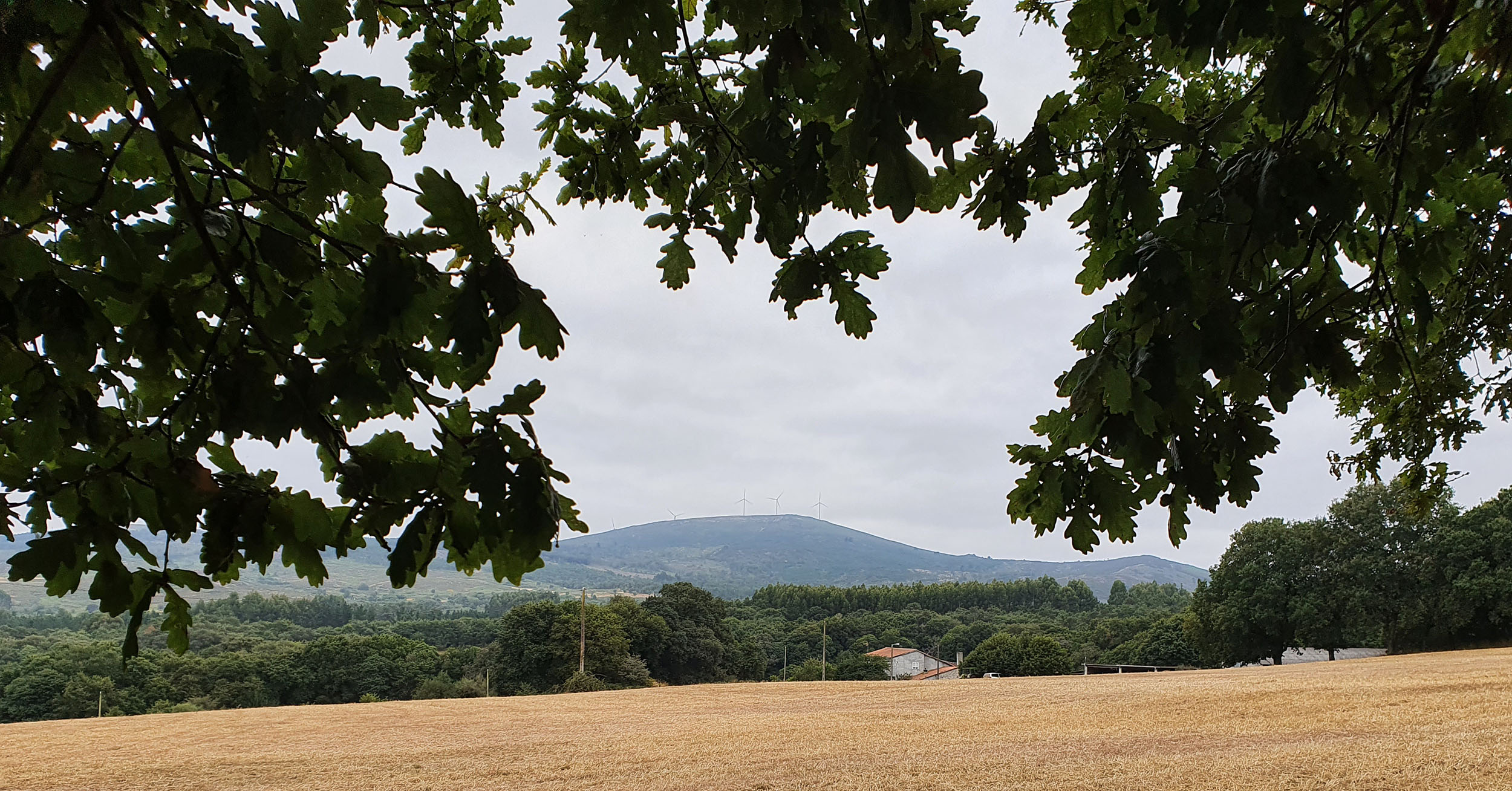 Lugar de Chacín, da parroquia de Castro de Amarante (Antas de Ulla). Unha soa vivenda, que se atopa entre os núcleos de Rececendes e Ludeiro.